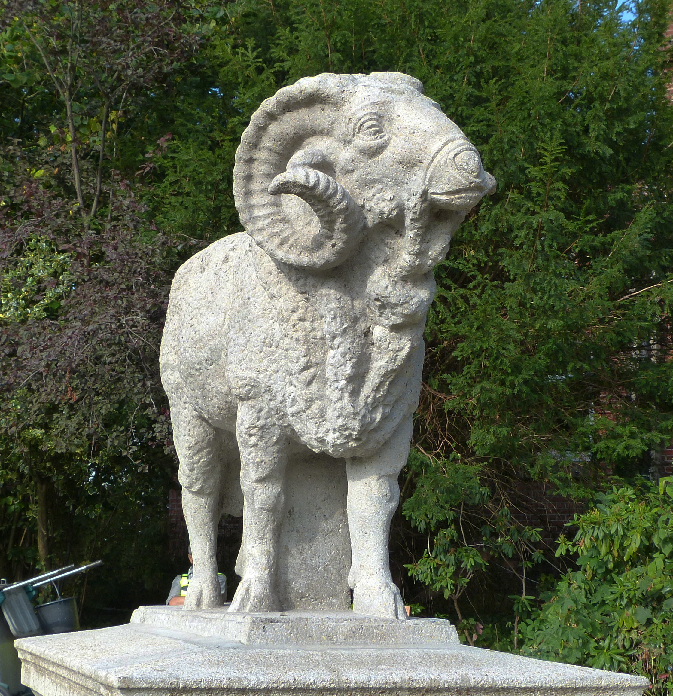 Bremer Wollkämmerei, Widder "Sir Charles" in Bremen, An der Wollkämmerei o. Nr.Das abgebildete Objekt ist ein geschütztes Kulturdenkmal in der Freien Hansestadt Bremen, mit der Nr. 2022 beim Landesamt für Denkmalpflege registriert.